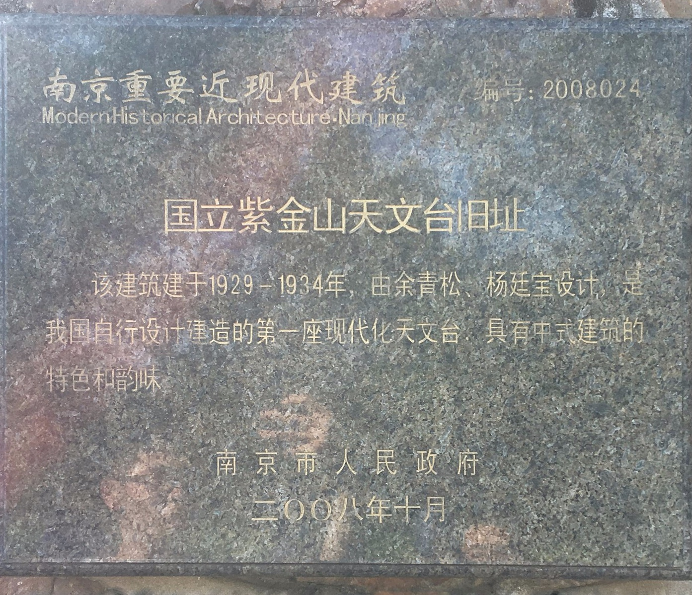 中文（中国大陆）: 国立紫金山天文台旧址的铭牌